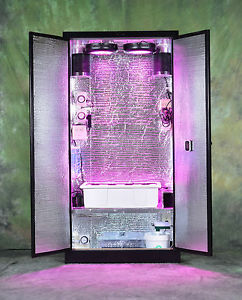 "оптимальный" по замеру гроубокс